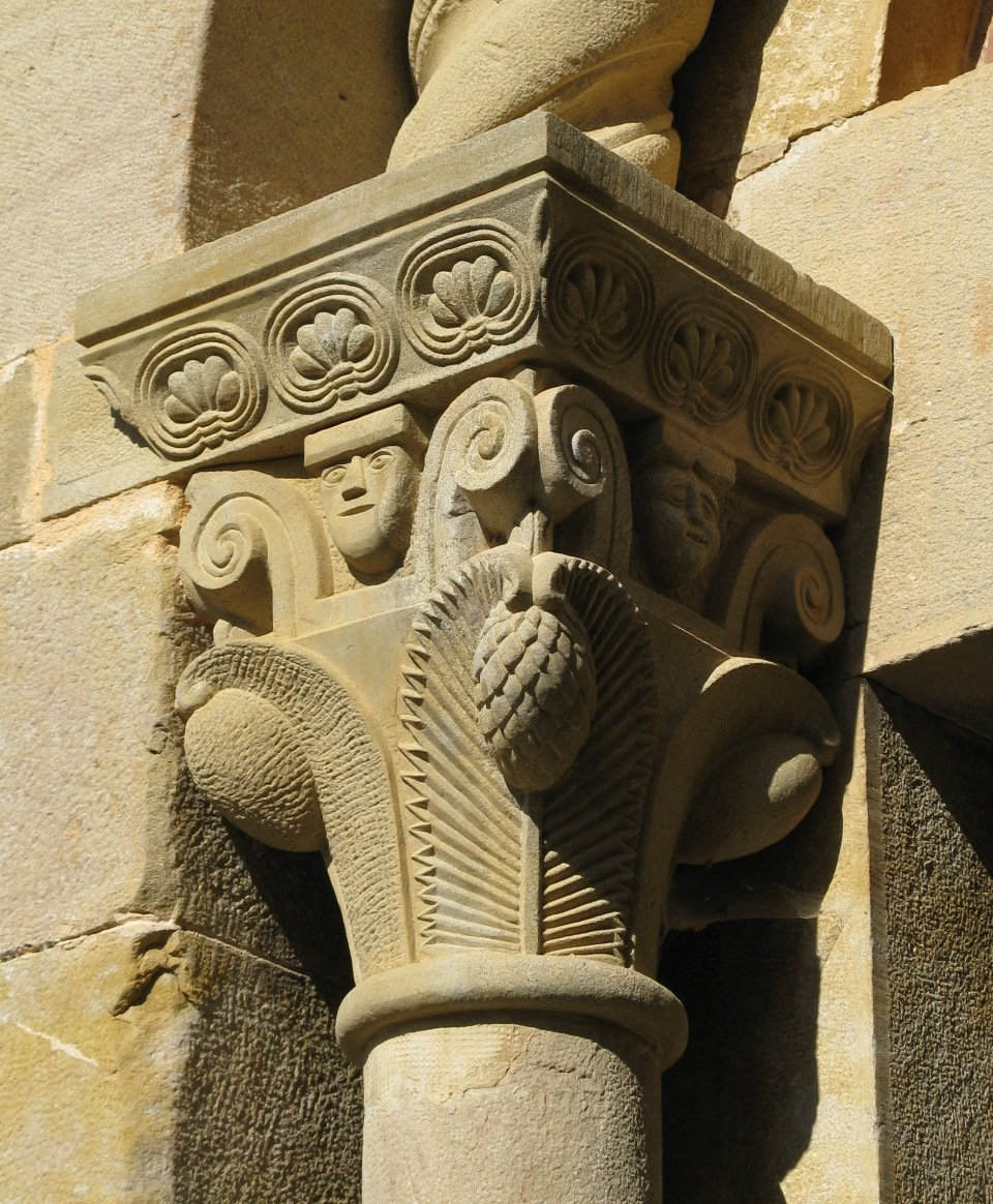 Sant Salvador de Bianya (Capital at Church Romanesque, Val de Bianya, Catalunya, Spain)